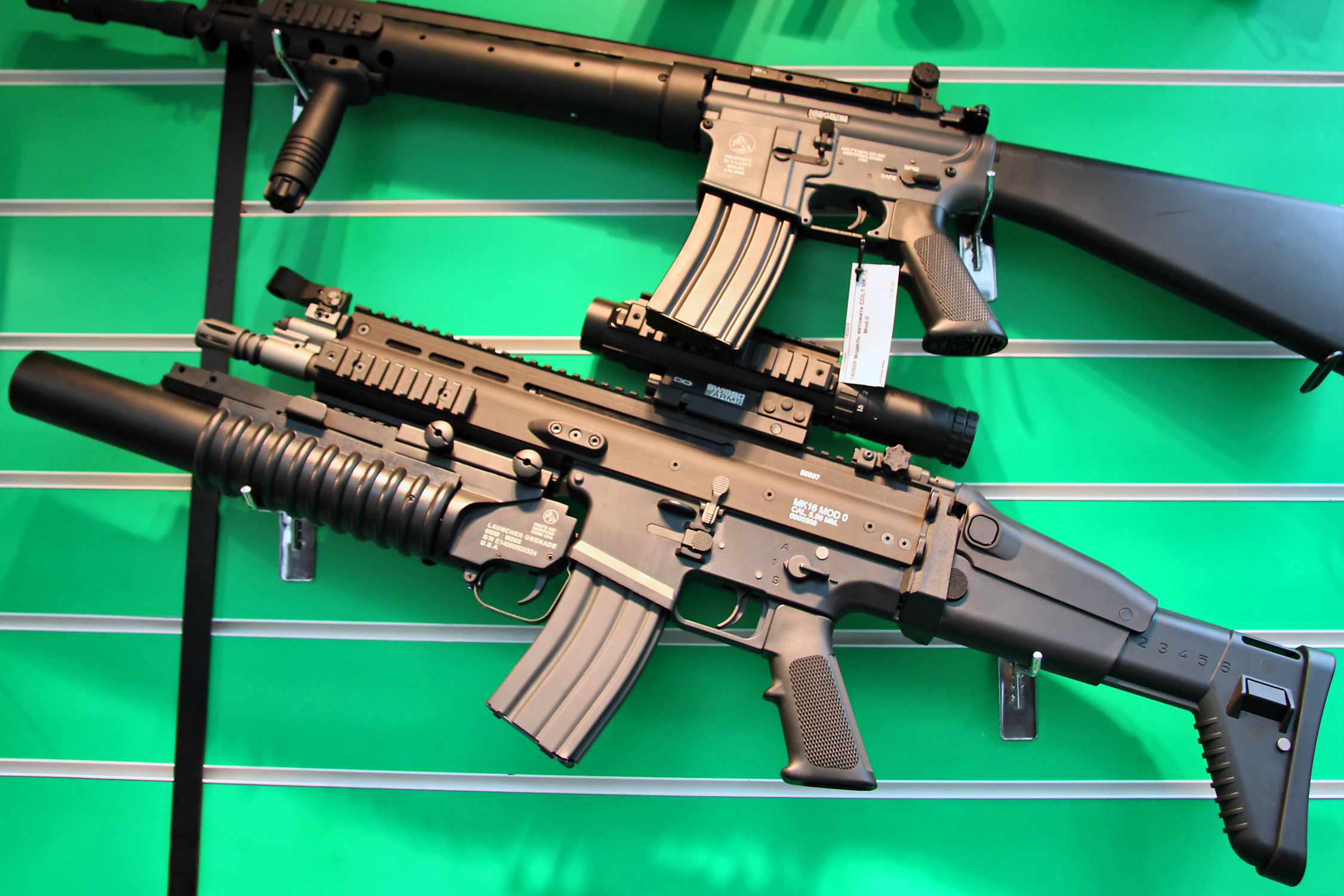 Mk16 MOD 0